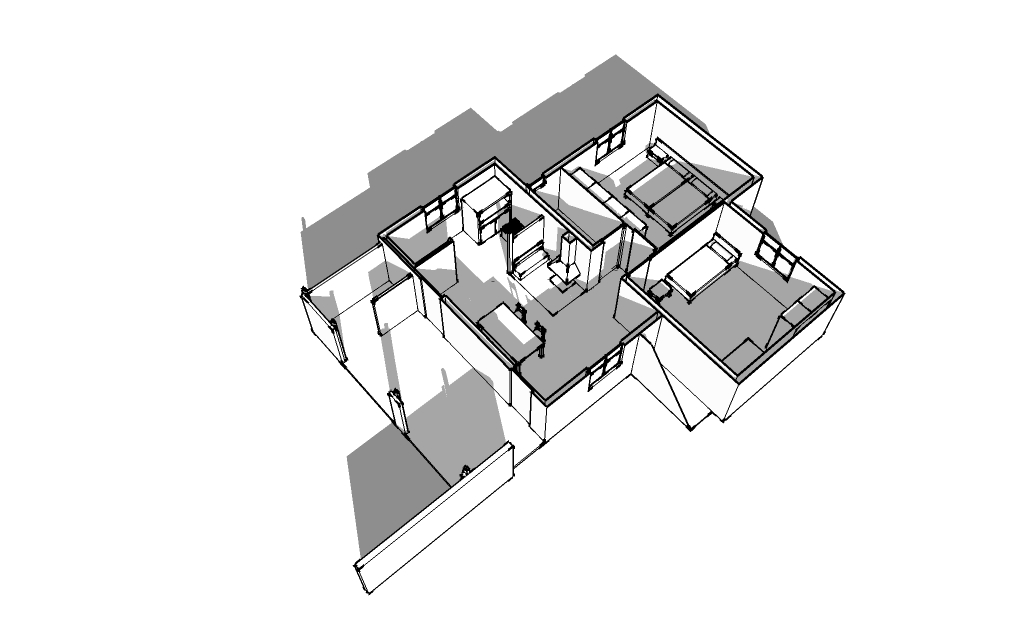 Veduta prospettica della Casa rurale, progettata e realizzata dagli architetti Piero De Amicis e Vincenzo Manente, collocata nel Parco realizzata per la X edizione della Triennale di Milano